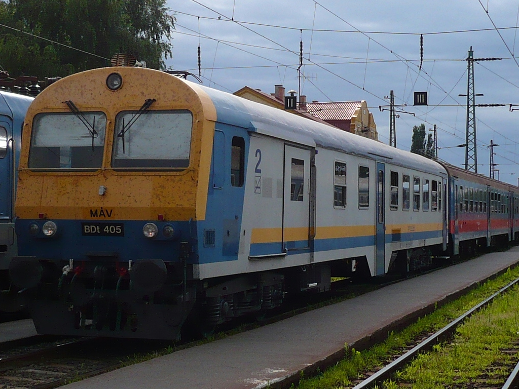 MÁv BDt 405-ös vezérlőkocsi Vác állomáson